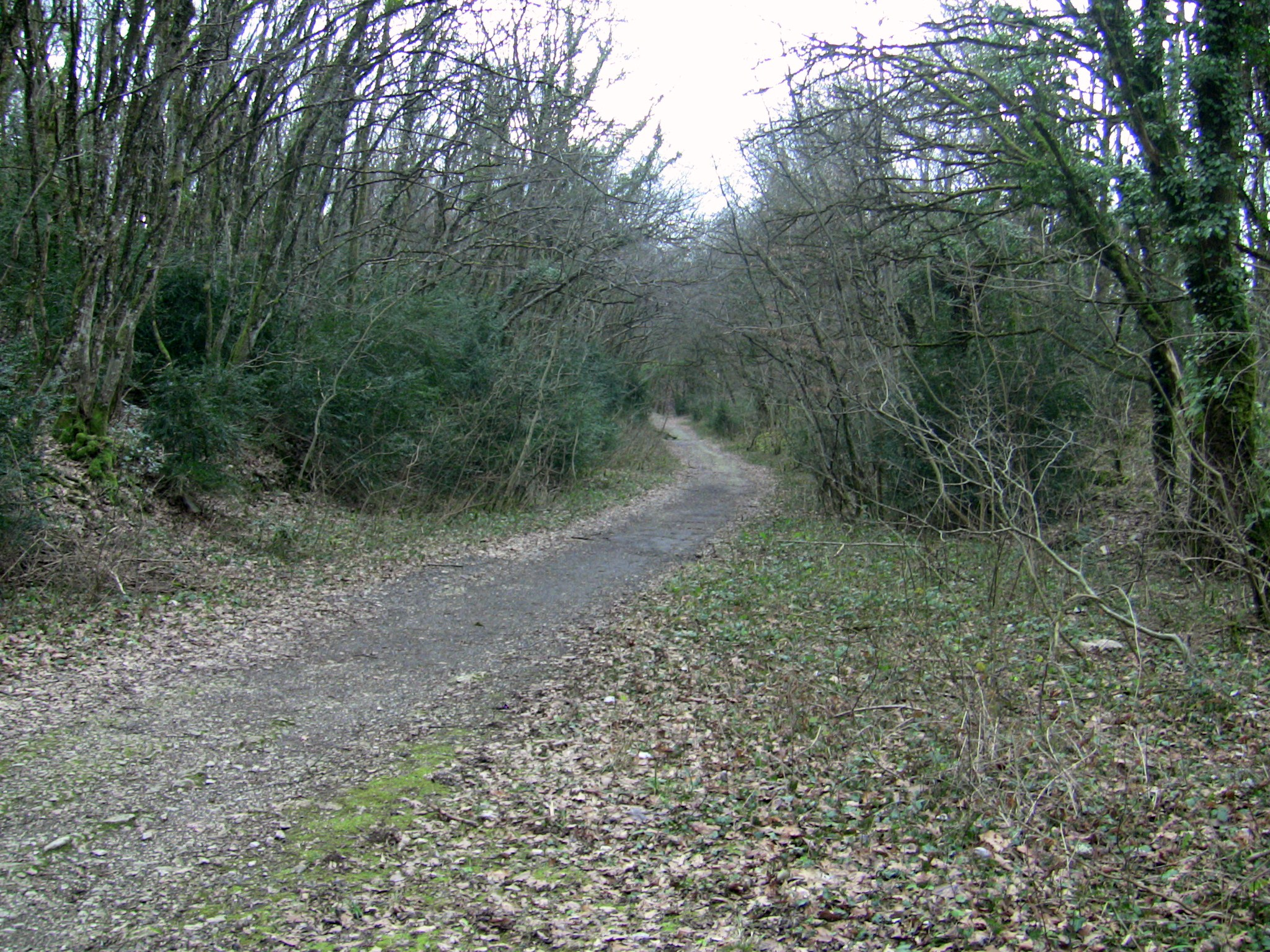 Chemin d'accès aux ouvrages annexes du fort de Planoise, à Besançon (Doubs, France).